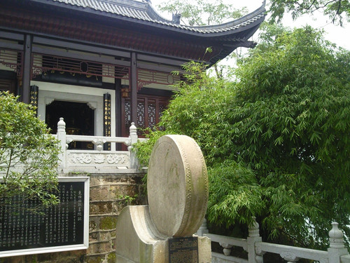 祭祀诸葛亮